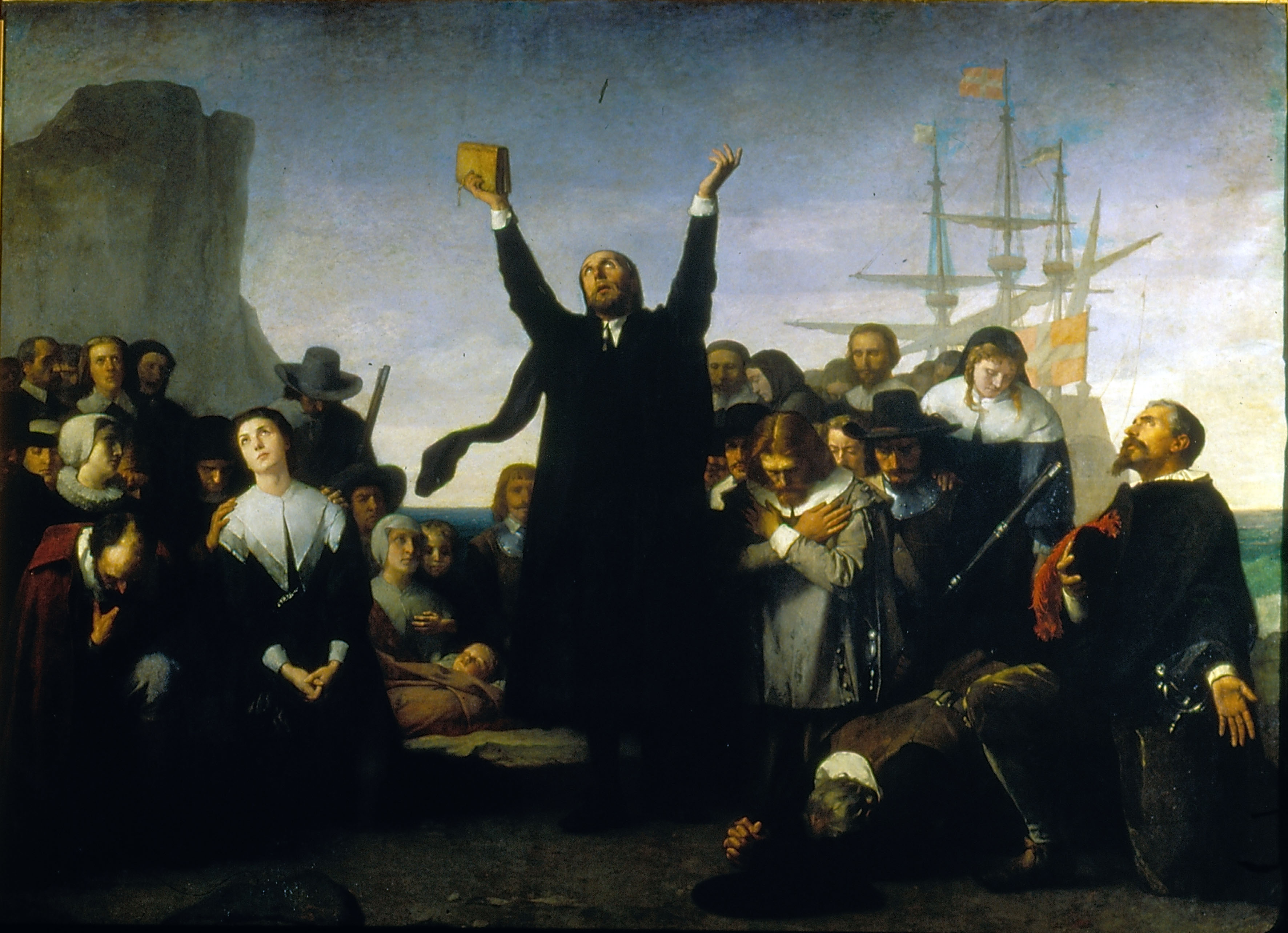 Lienzo que representa el desembarco de los puritanos en América en 1620. Los Padres peregrinos viajaron a bordo de la nave Mayflower.